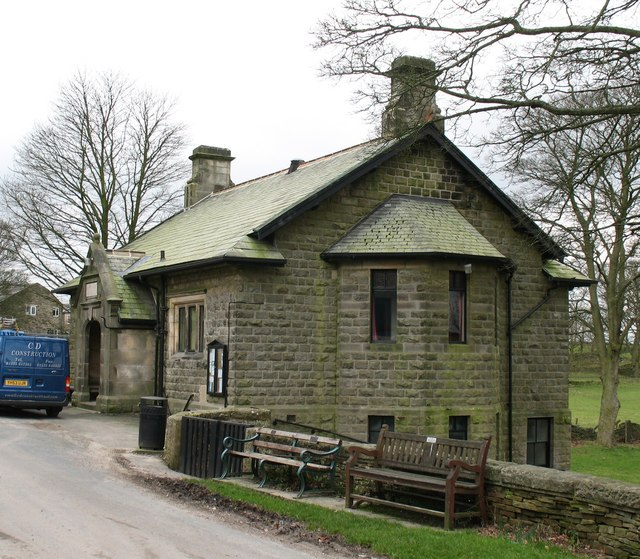 Timble village hall, built in 1892